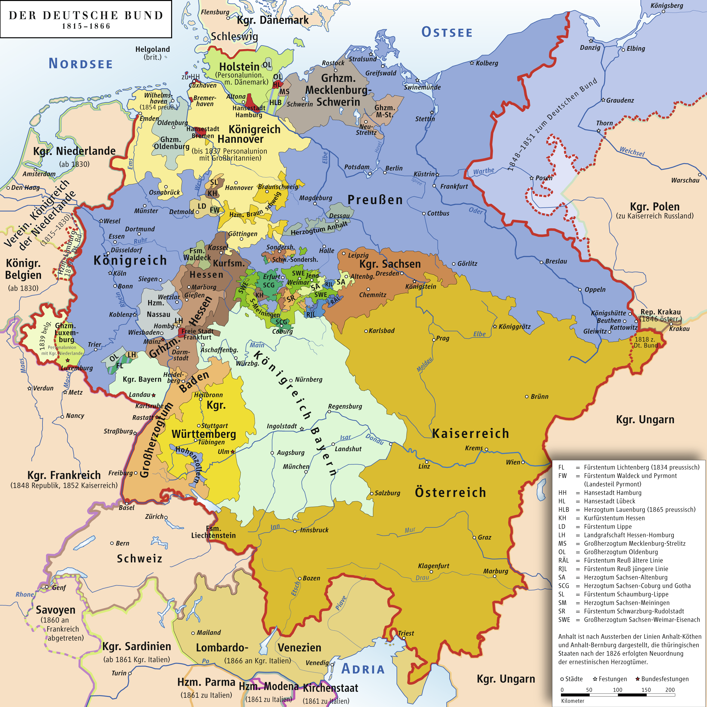 Karte des Deutschen Bundes 1815–1866 / Map of German Confederation 1815–1866